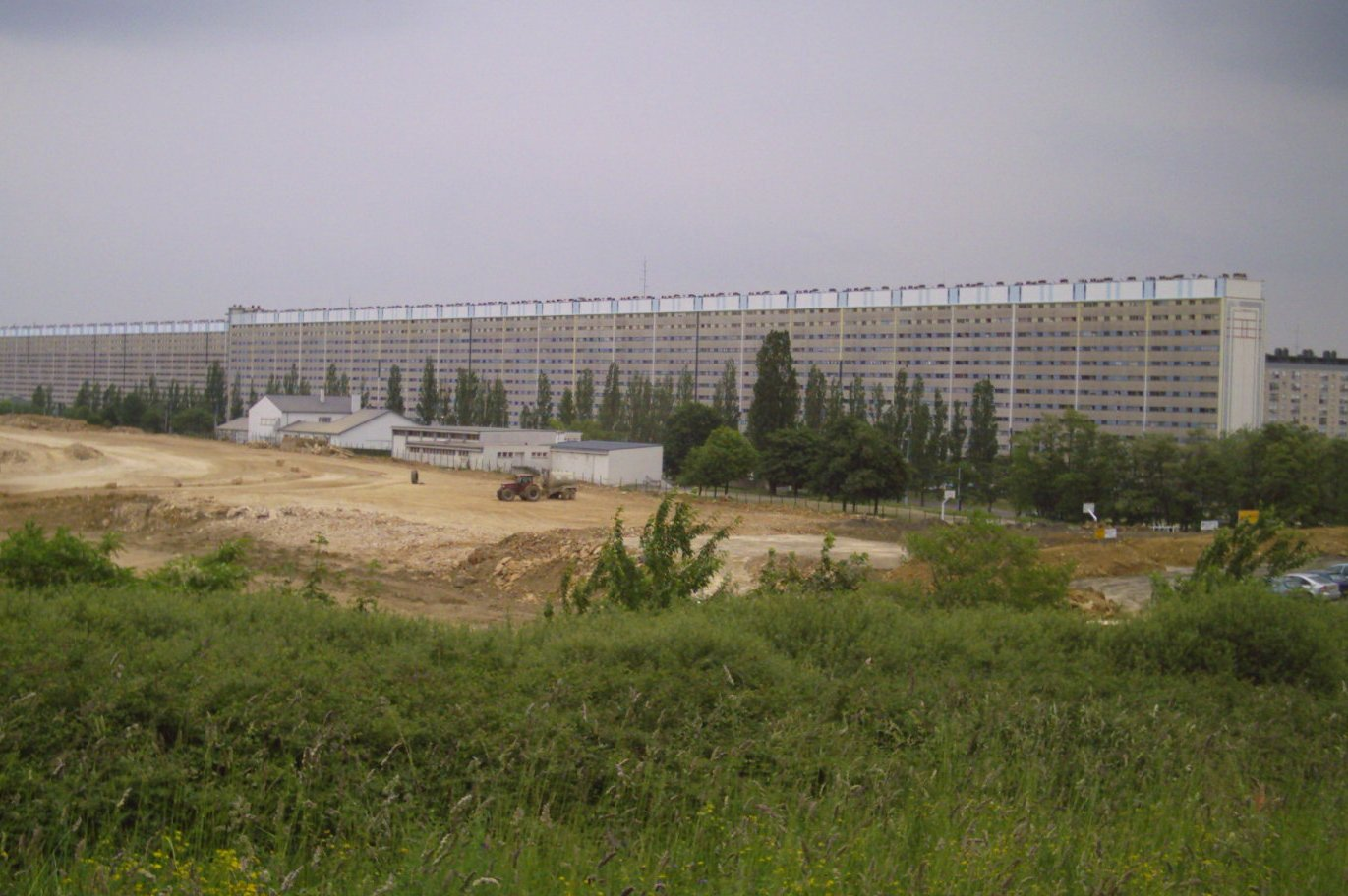 Cité du Haut du Liève à Nancy (3000 logements - Bernard Zehrfuss architecte)